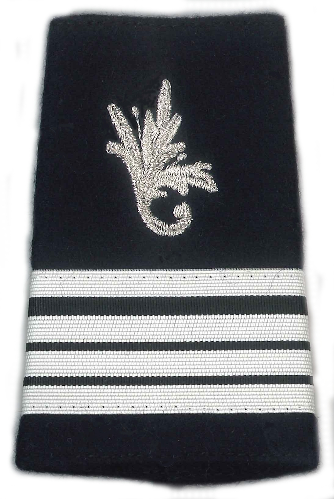 Fourreau d'épaule de commissaire commandant de l'armée de terre